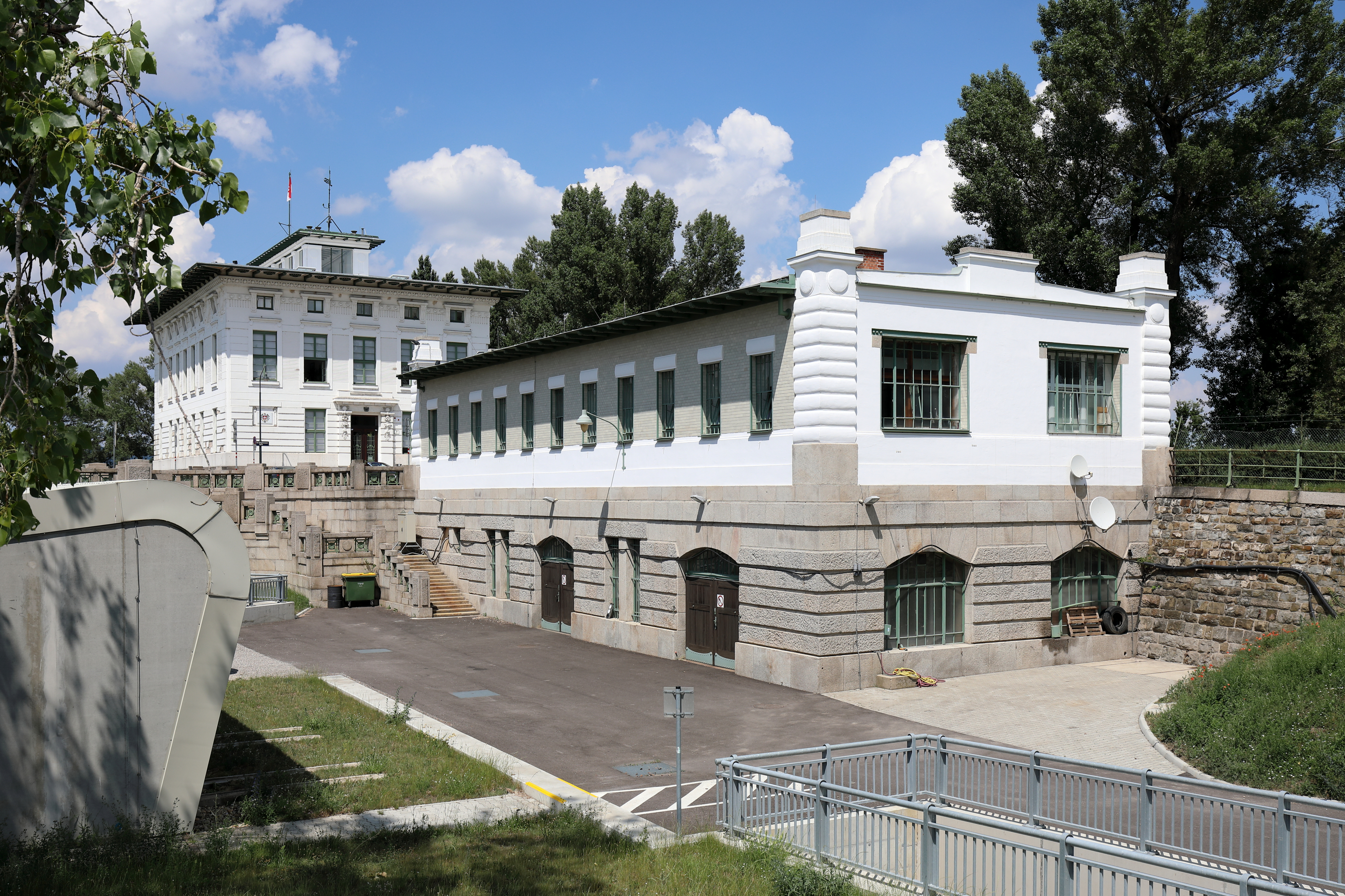 Das sogenannte „Kettenmagazin“ der Nussdorfer Wehranlage an der Grenze zwischen dem 20. Wiener Gemeindebezirk Brigittenau und dem 19. Gemeindebezirk Döbling. Dahinter das Verwaltungsgebäude für die ehemalige „Donau-Regulierungs-Commission“, ganz links das Gebäude des 2004/2005 errichteten Kleinkraftwerkes und rechts unten die 2016/2017 gebaute Fischtreppe.Die ursprüngliche Wehranlage mit der Schemerlbrücke, dem Verwaltungsgebäude und dem Kettenmagazingebäude wurde von Otto Wagner entworfen und von 1894 bis 1898 errichtet.